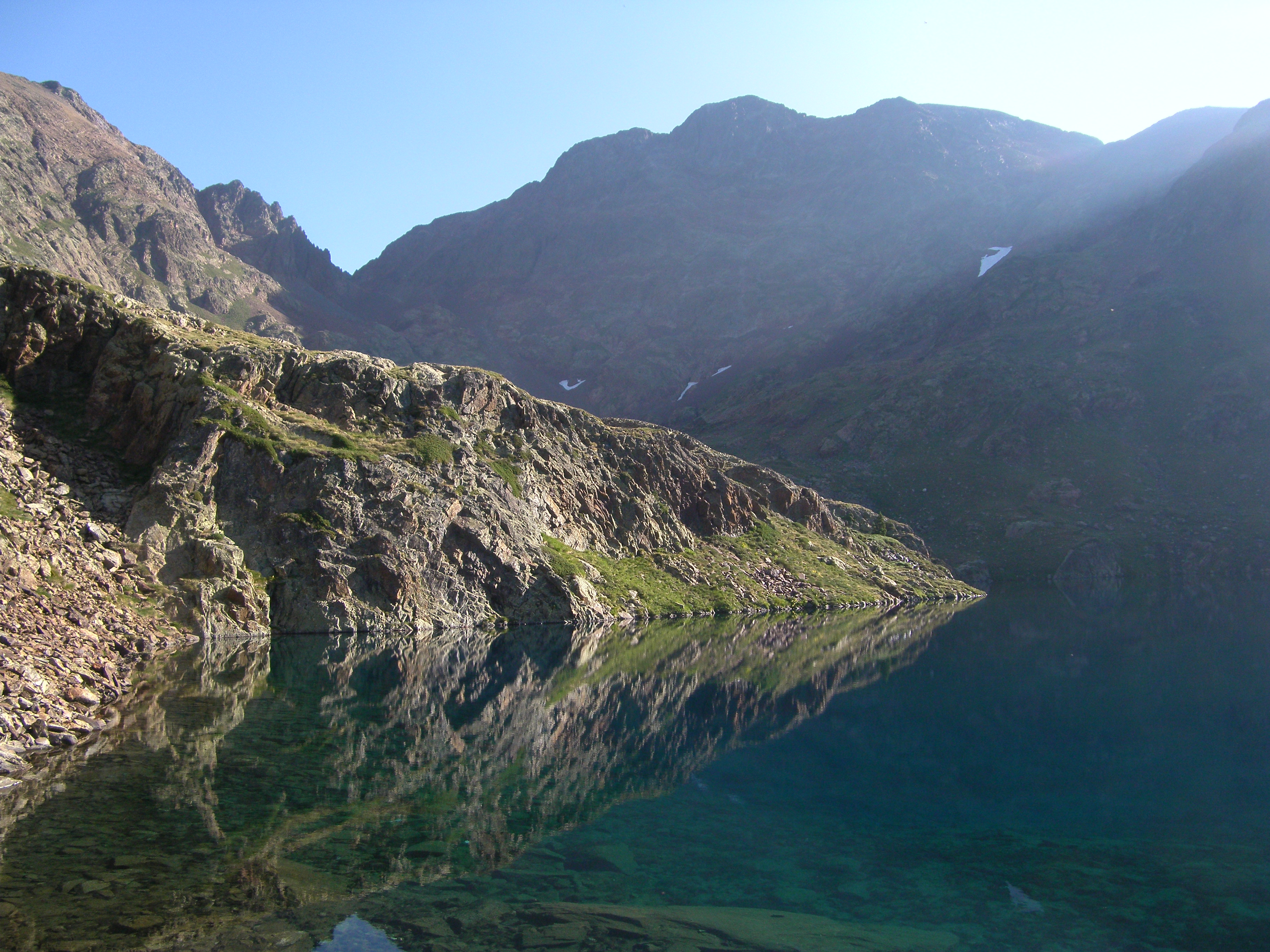 Pica d'Estats (3143m)